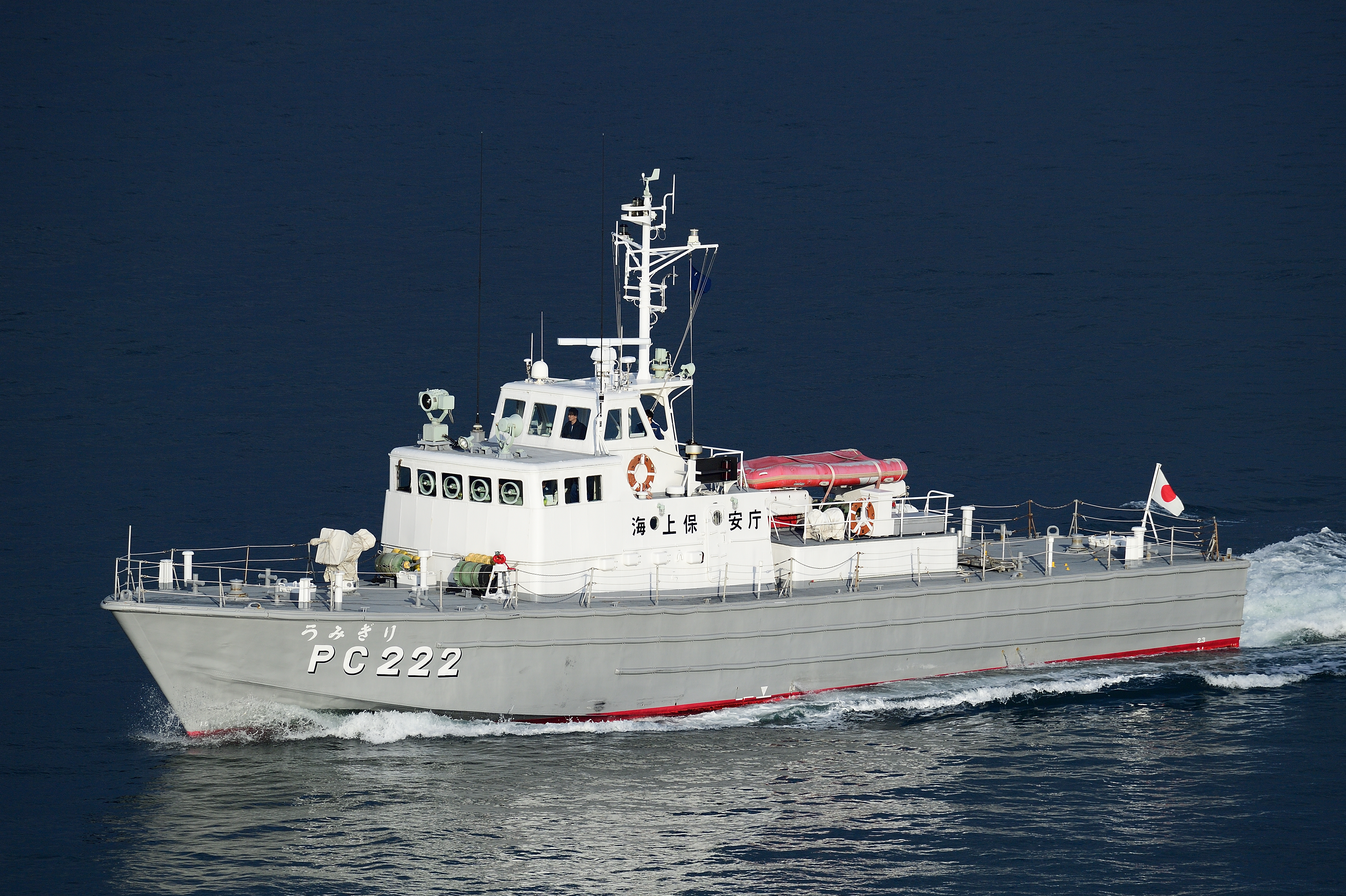 海上保安庁のむらくも型巡視艇「うみぎり」PC222。